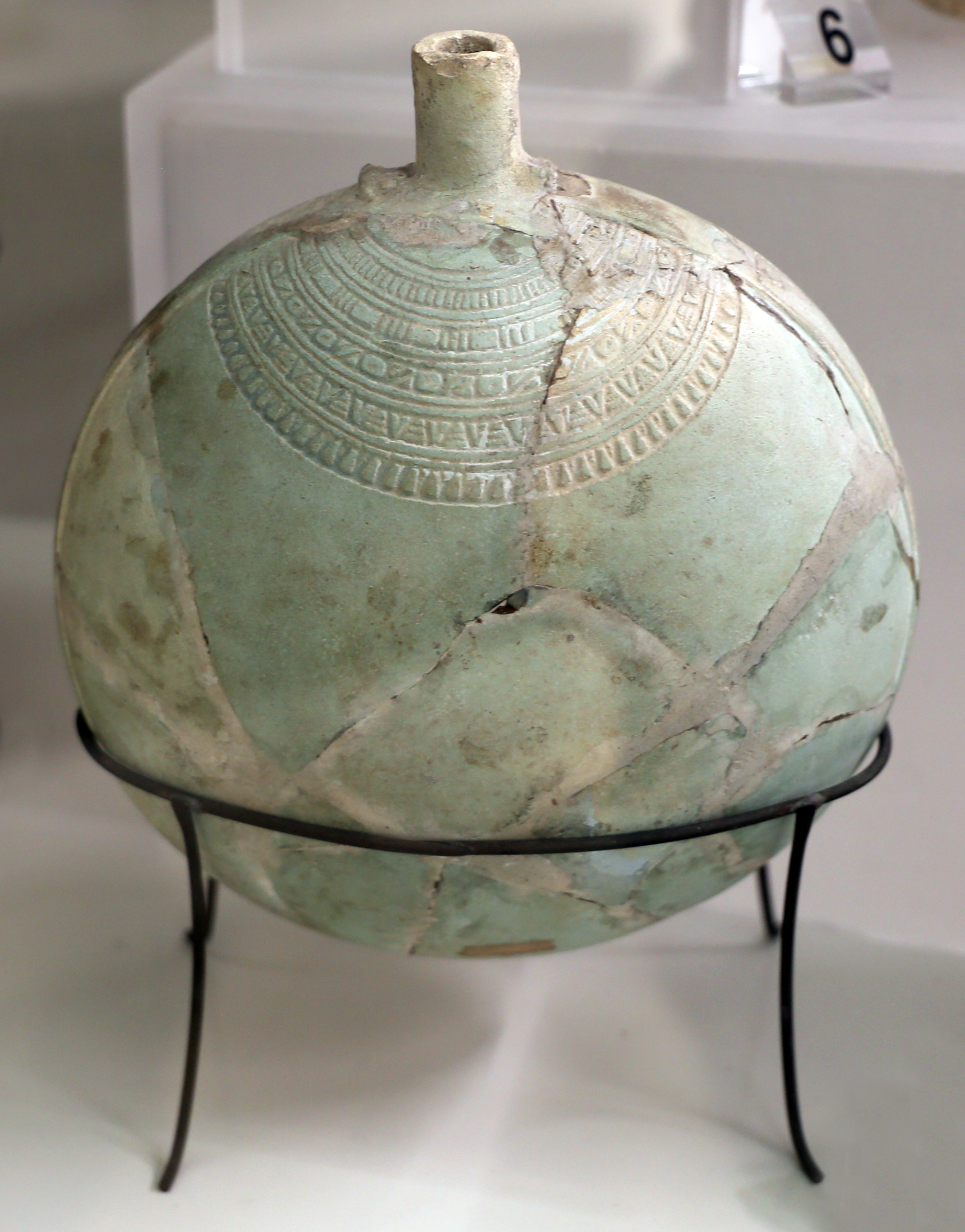 Villa Giulia (Rome) This is a photo of a monument which is part of cultural heritage of Italy.